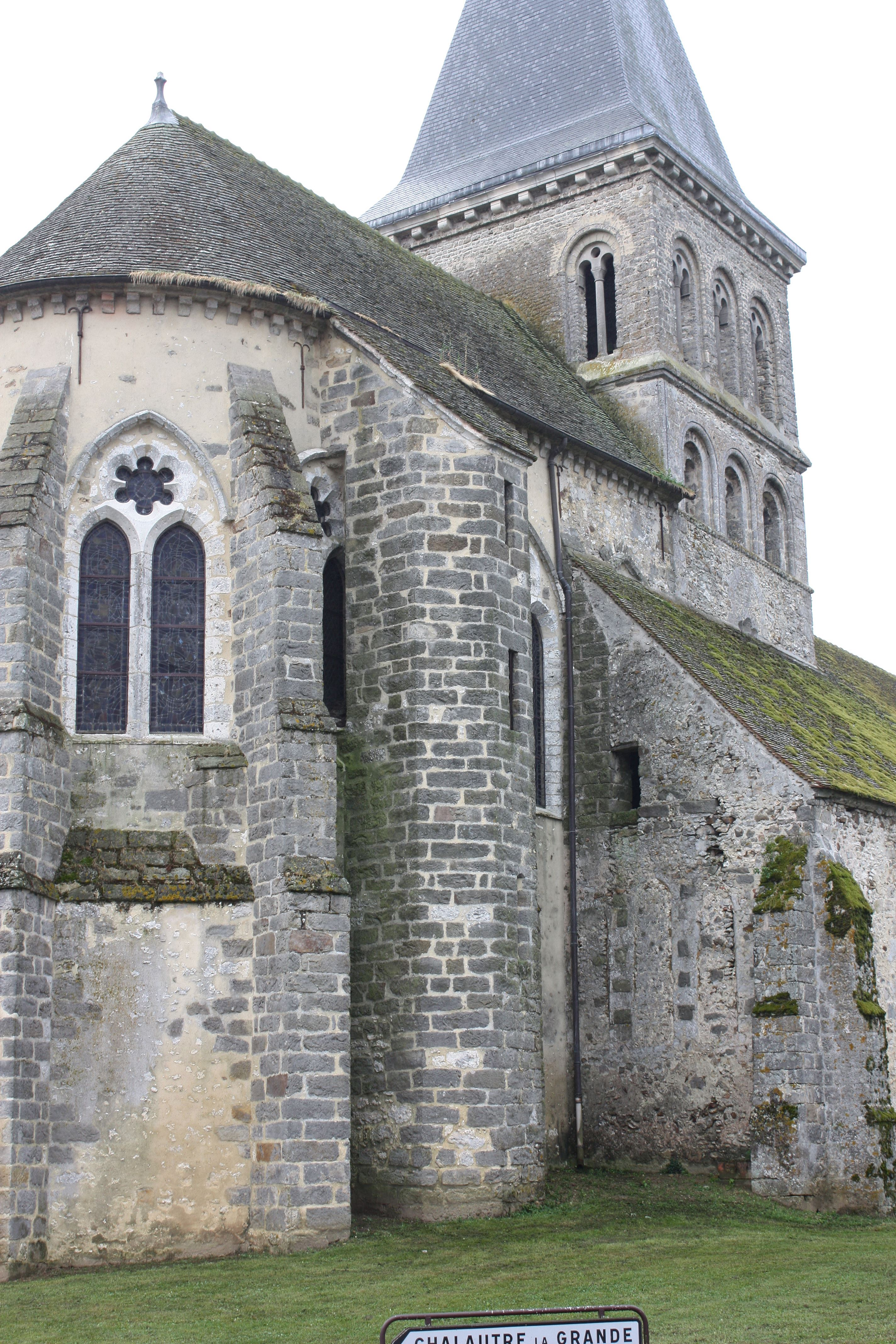 Beauchery - Eglise Saint-Pierre Vue du Nord-Est